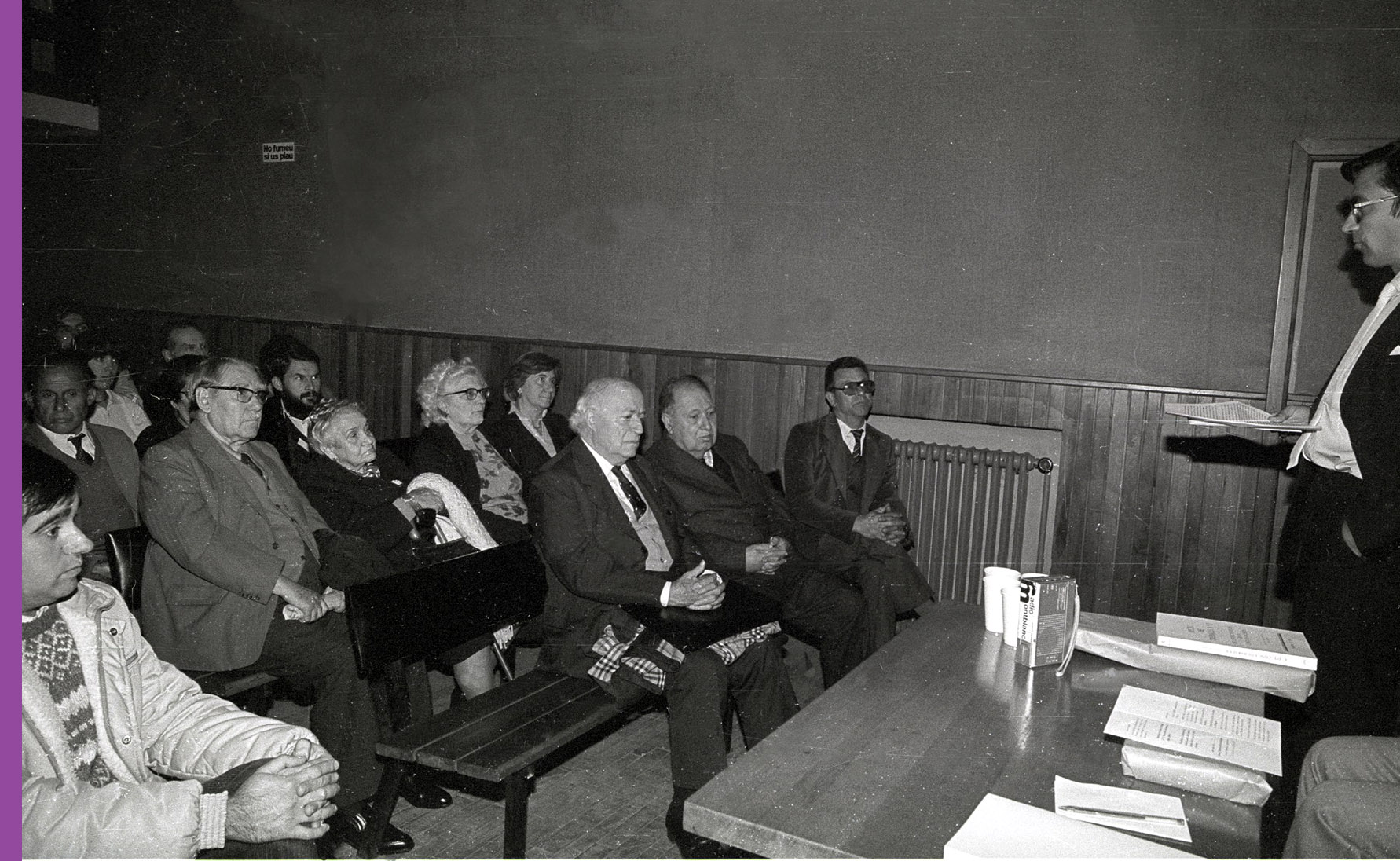 1983. Homenatge a Josep Iglésies del Centre d'Estudis de la Conca de Barberà. Pere Anguera llegeig una semblança de l'homenatjat.